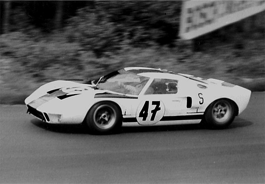 Ford GT 40 von Withmore/Neerpasch beim Training zum 1000-km-Rennen auf dem Nürburgring, Auffahrt zum Karussell